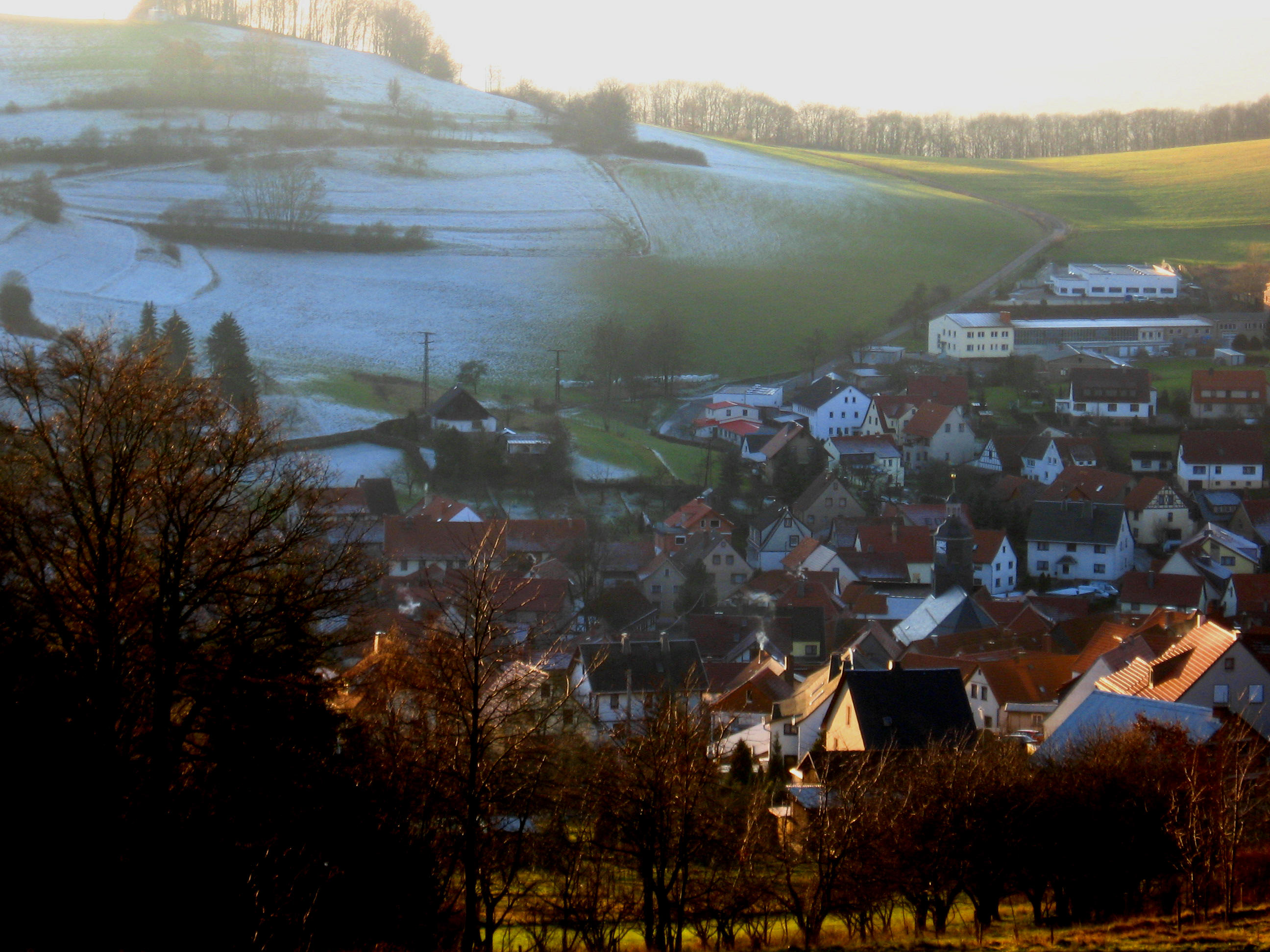 Ortsteil Struth-Helmershof aus Richtung Schulwiese im Winter, Floh-Seligenthal, Thüringen, Deutschland